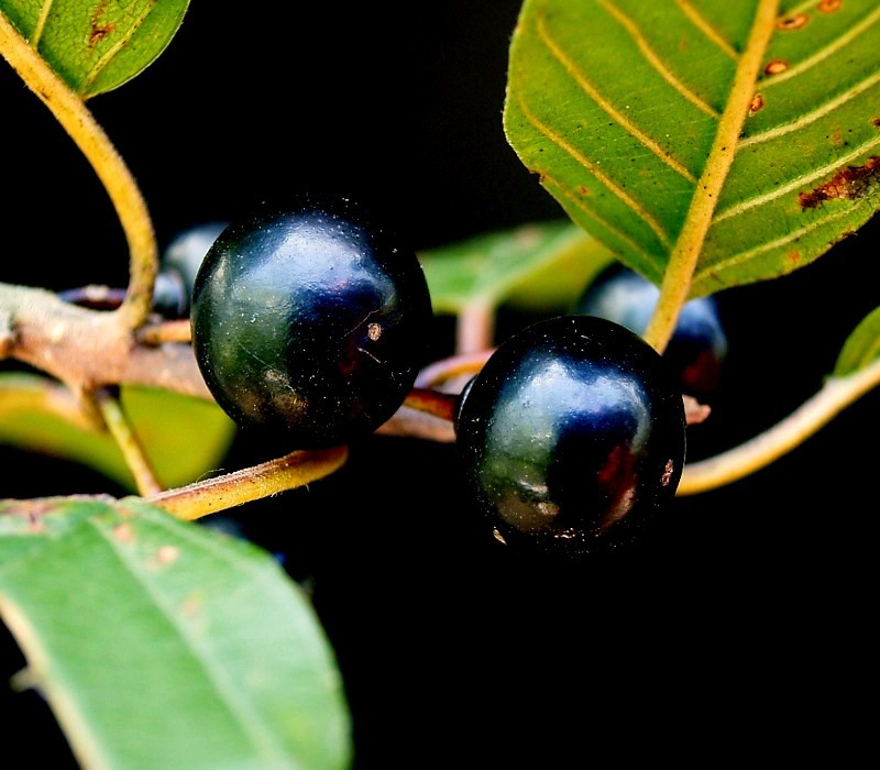 Rhamnus frangula